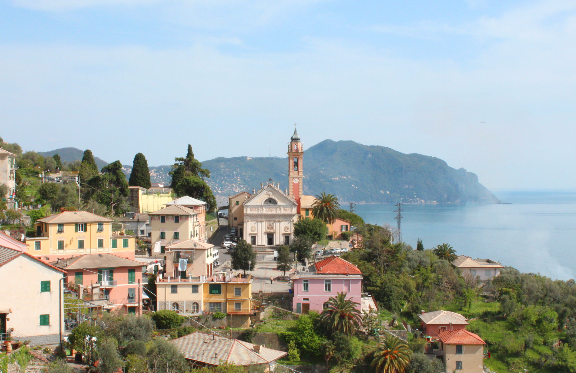 Scatto del centro del paese di Pieve Ligure